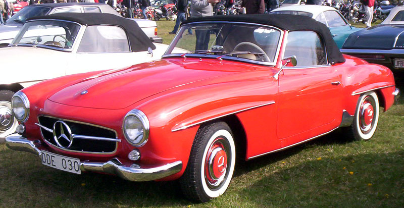 Mercedes-Benz 190 SL 1958